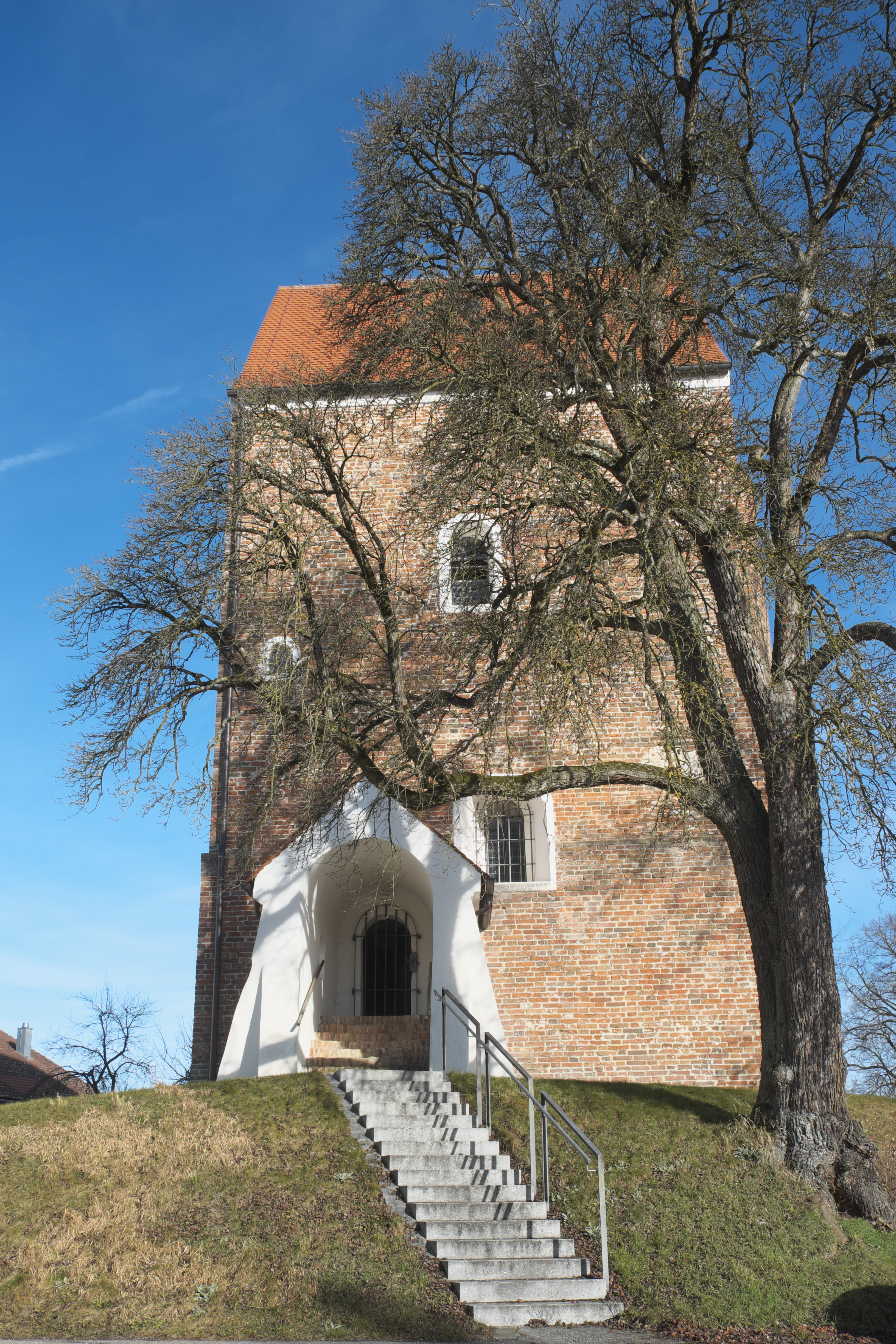 Katholische Filialkirche Unsere Liebe Frau in Gasseltshausen (Aiglsbach) im niederbayerischen Landkreis Kelheim (Bayern/Deutschland)